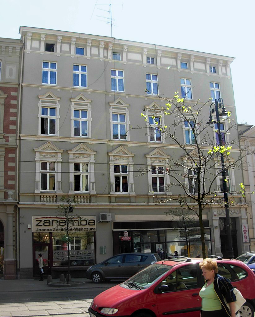 Kamienica ul. Gdańska 58 w Bydgoszczy